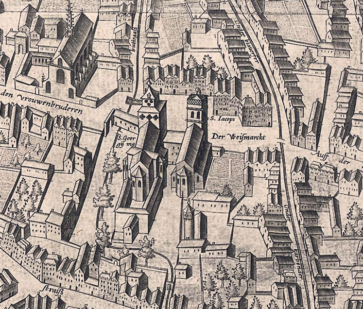 Ausschnitt des Mercator - Stadtplanes, St. Jakob und St. Georg am Waidmarkt.